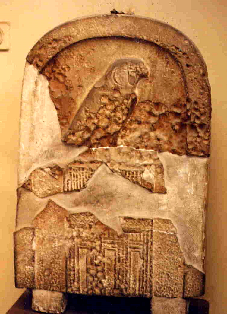 Stela of King Djer from Abydos